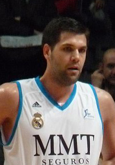 Felipe Reyes